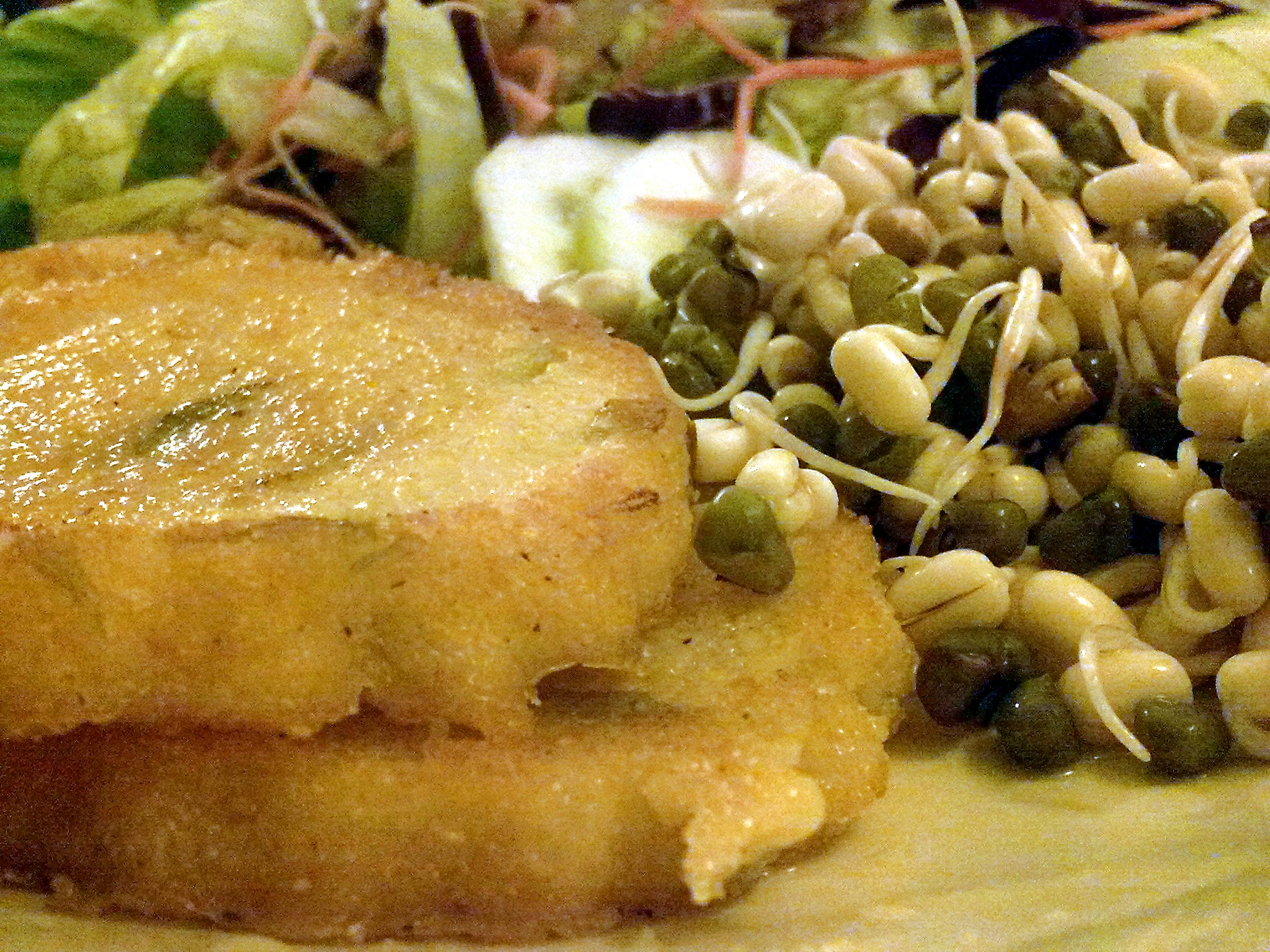 English recipe Ricetta in Italiano Receita em português Receta de polenta básica Ingredientes para 4-6 personas - 6 tazas de agua o caldo - 2 cucharaditas de sal - 1 cucharada de aceite de oliva - 2 tazas de harina de maíz Pon el agua a hervir. Añade la sal y echa la polenta poco a poco removiendo bien para que no se hagan grumos. La proporción de agua/polenta cada uno me da una distinta, yo uso más o menos 4 a 1. Pero no es demasiado importante, total, hay que seguir removiendo hasta que quede una masa consistente. Eso te llevará de 10 a 30 minutos, dependiendo del agua y del tipo de polenta que tengas a mano. Puedes usar caldo en vez de sólo agua, o añadir cualquier cosa para que le dé sabor. Yo en esta receta usé sofrito de ajos tiernos, aunque mucha gente le pone queso. La polenta sola no te la recomiendo, queda demasiado sosa. Fuente Polenta frita Una vez hecha la polenta básica, vuélcala en un molde grande o en varios moldes pequeños. Te recomiendo que no sea más de un dedo de gruesa. Al día siguiente se habrá solidificado en una especie de gelatina dura. La puedes cortar en bastones, triángulos o la forma que más te guste. Yo dejo en la nevera una ración y congelo el resto. Cuando vayas a cocinarla, pon una sartén a calentar con un poco de aceite de oliva y fríe los trozod de polenta hasta que estén crujientes por todos los lados. Cuidado al darles la vuelta porque al freirse se ablanda un poco. Puedes quitar el exceso de aceite con una servilleta de papel. Fuente